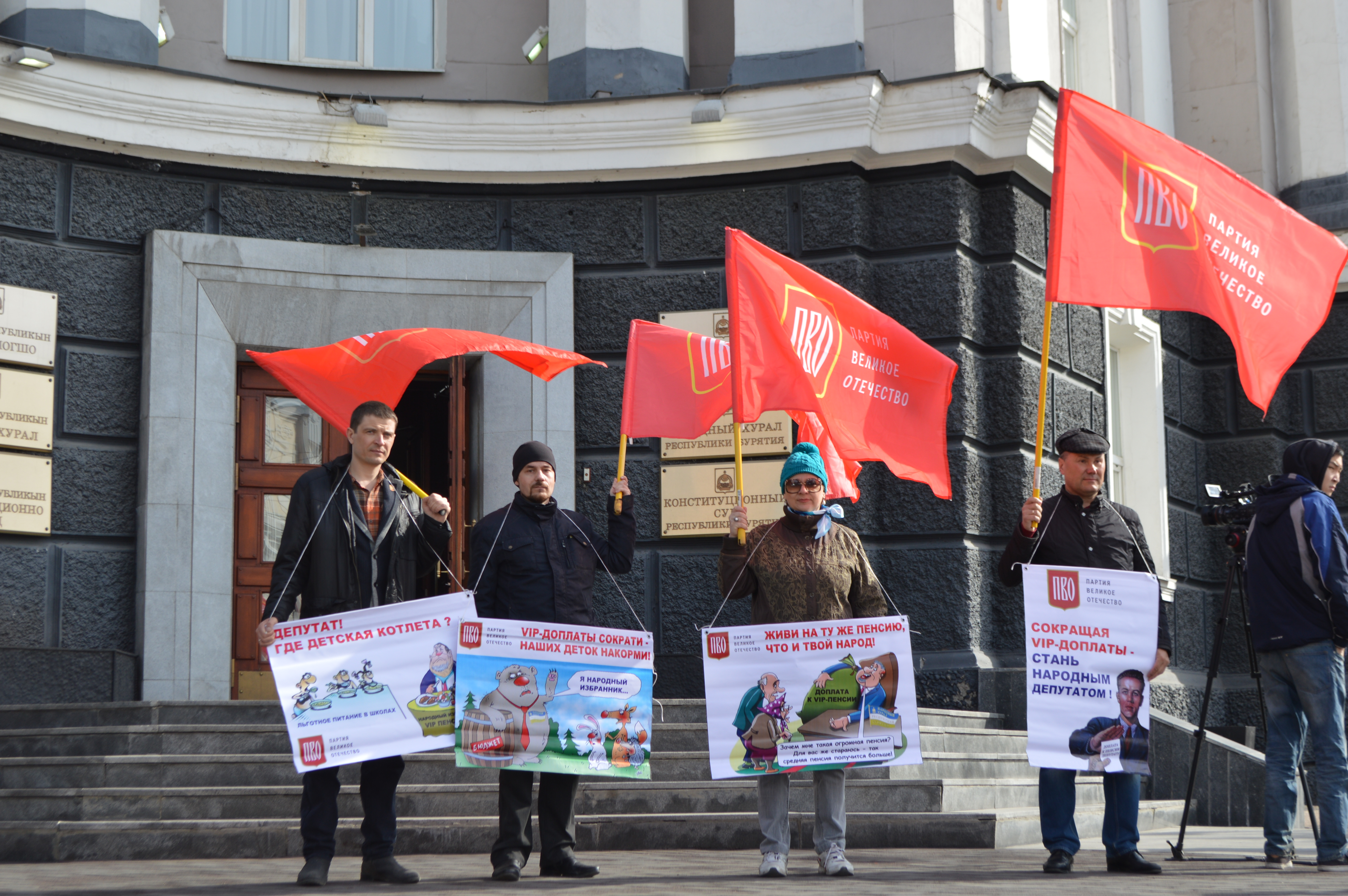 Павел Желибо во время протеста в апреле 2016 года против доплат к так называемым "VIP-пенсиям" (экс-чиновников, депутатов) у входа в здание Народного Хурала